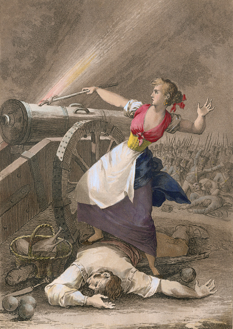 Agustina de Aragón, heróica defensora de la ciudad de Zaragoza.